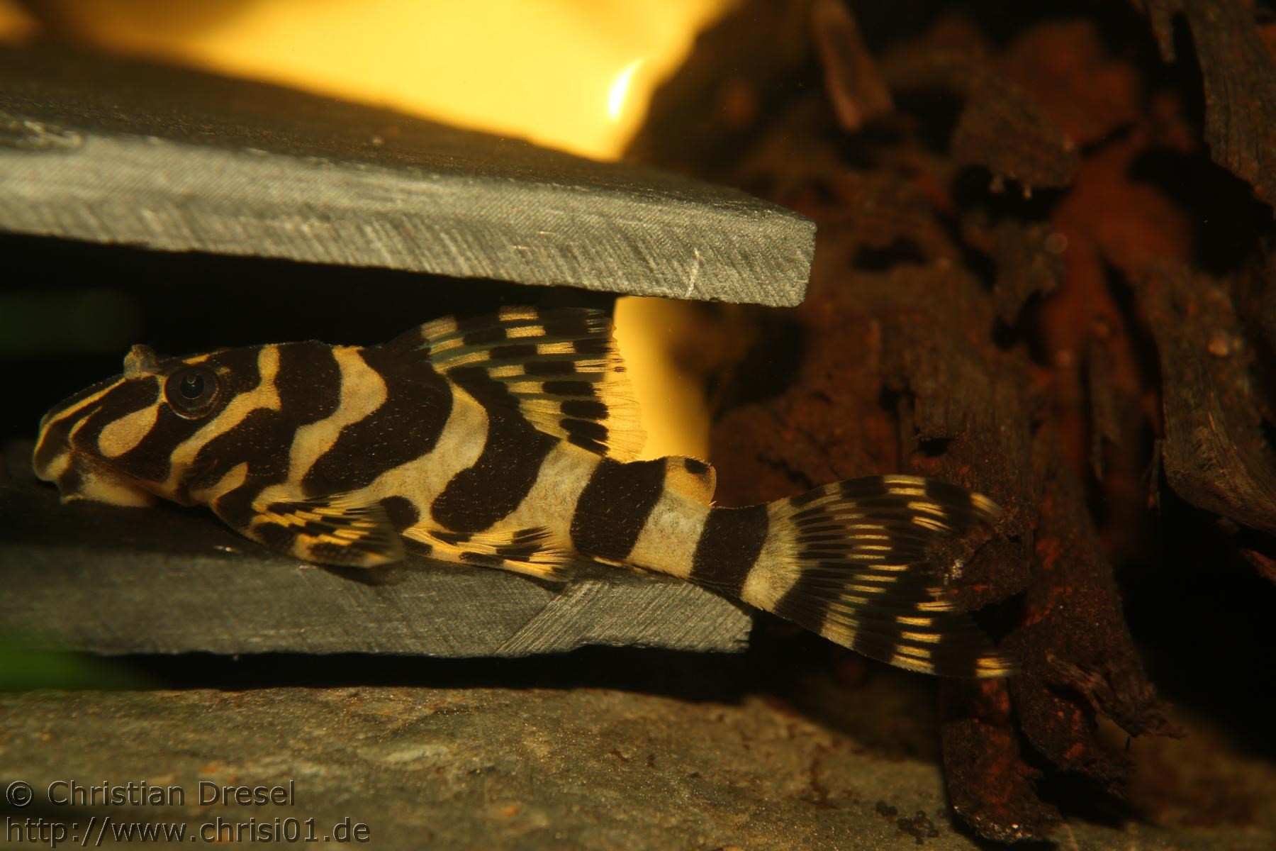 Peckoltia compta auch L134 genannt